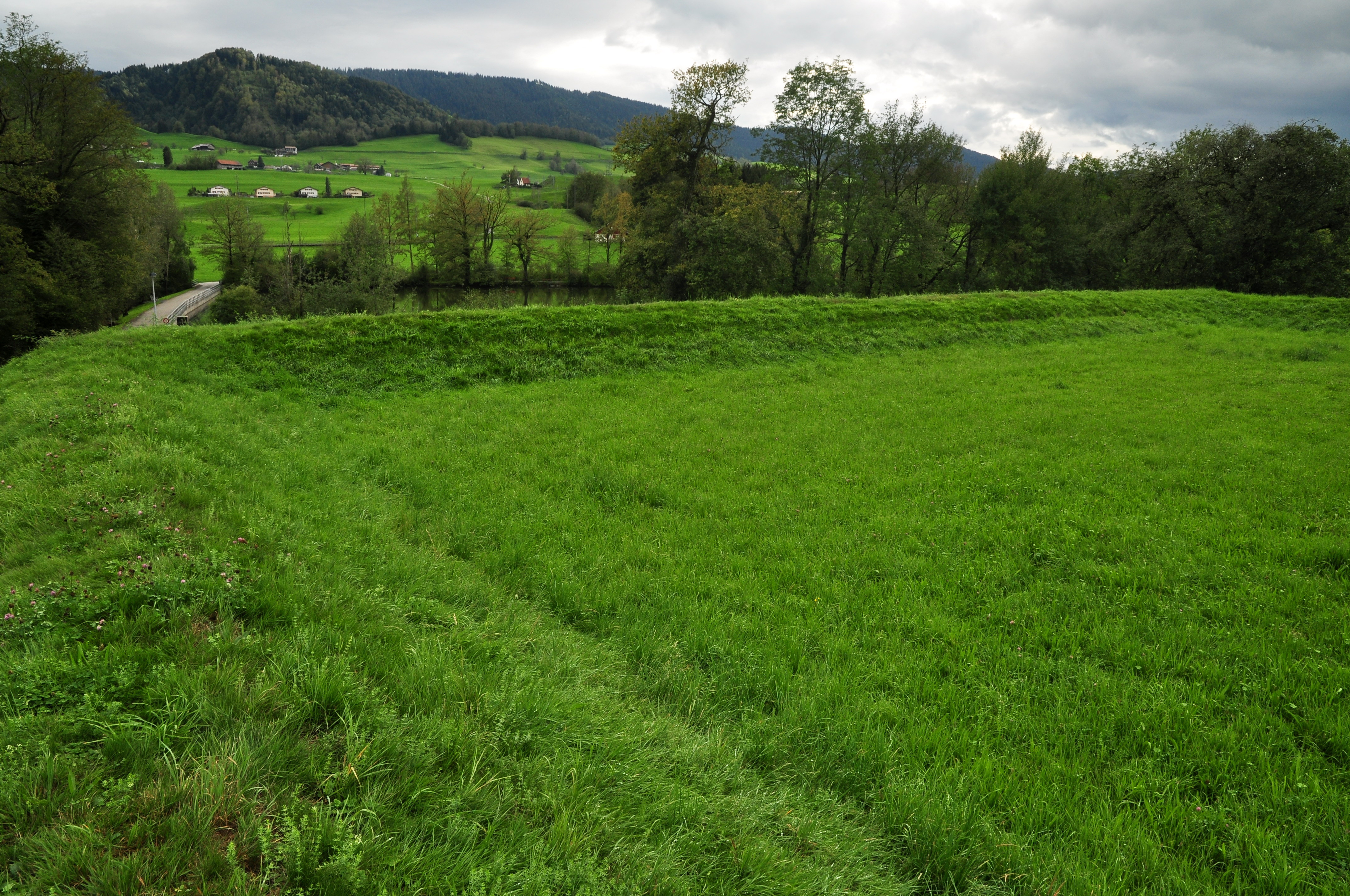 Samstagern, neuzeitliche Schanze «Sternenberg» in Richterswil (Switzerland)